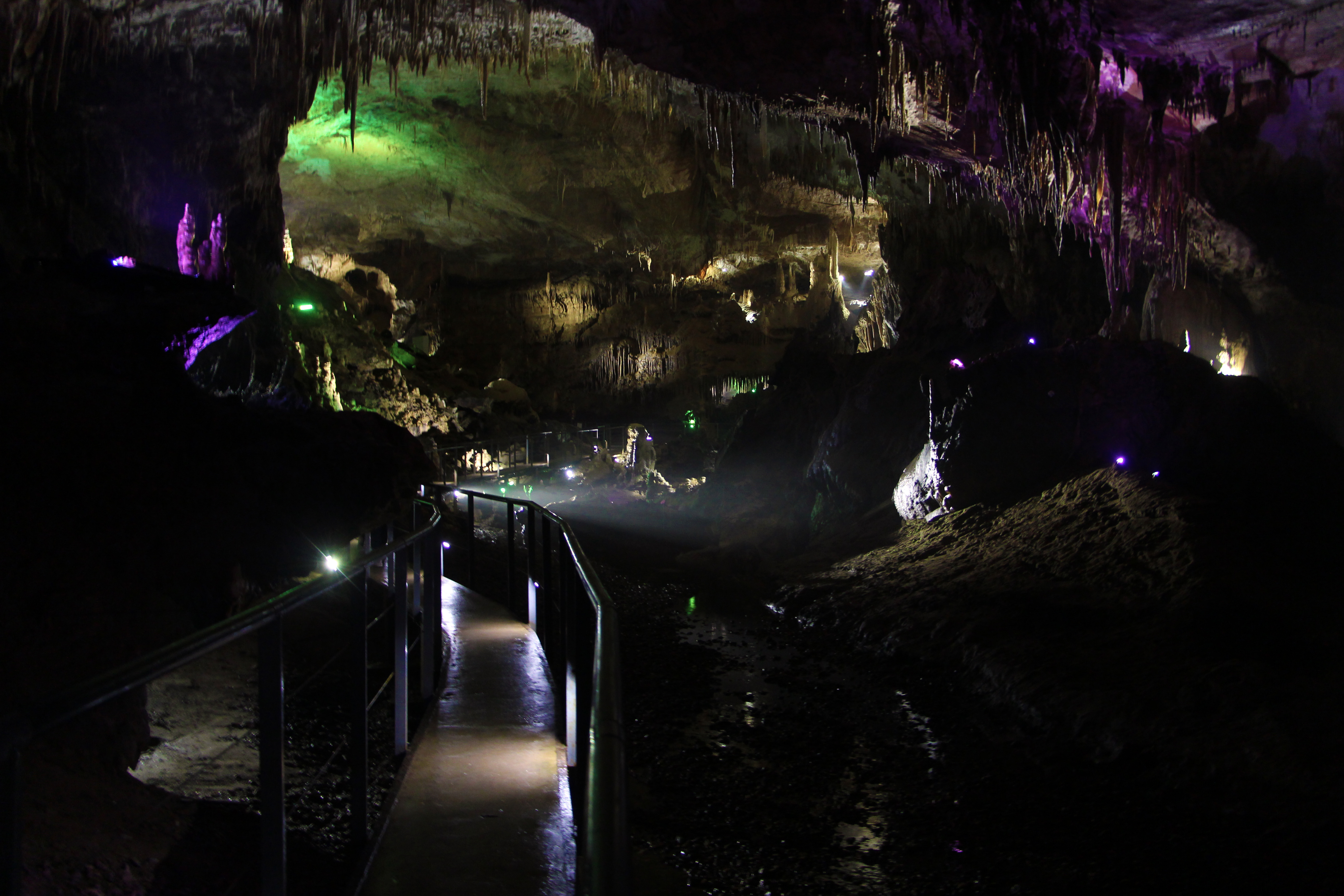 Пещера Кумистави, туристический маршрут, ведущий через пещеру